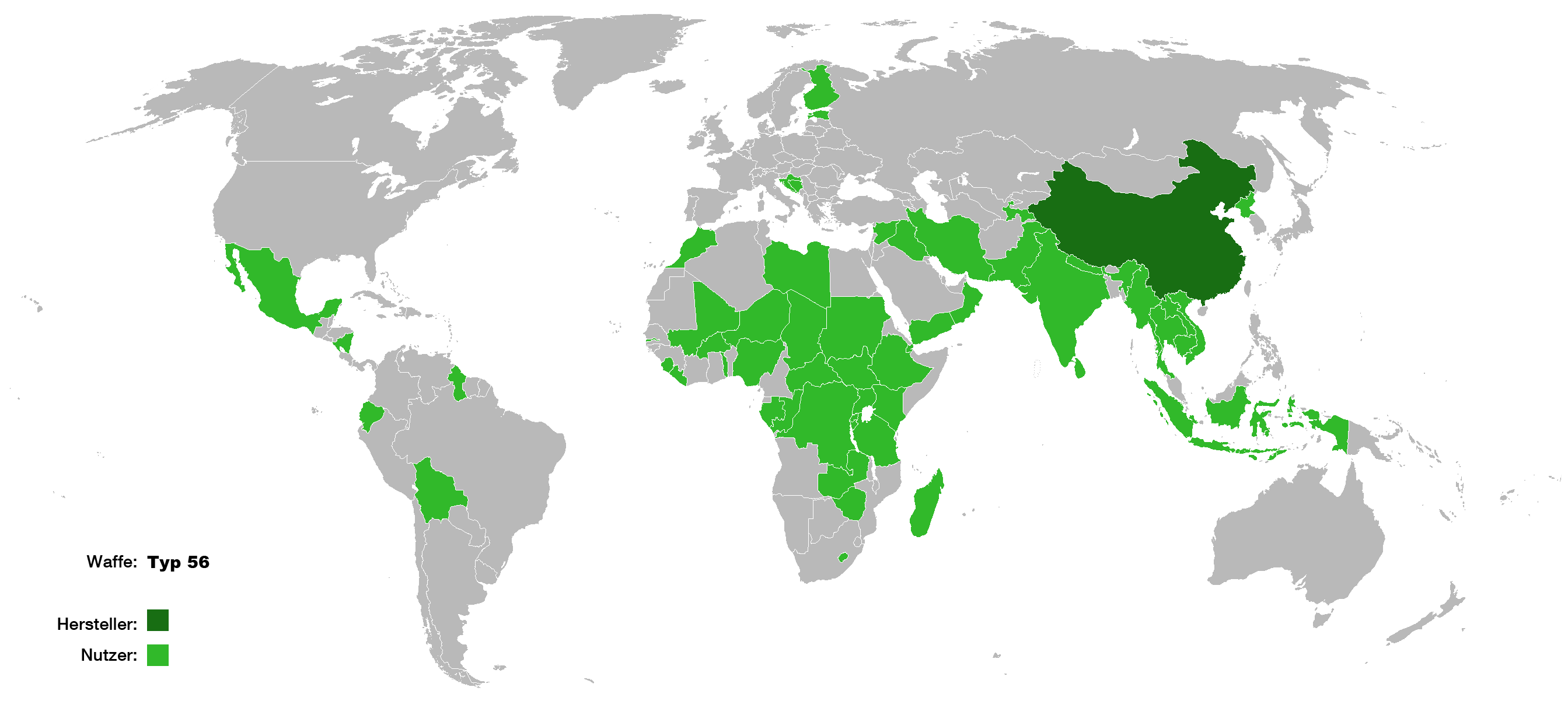 Verbreitung des chinesischen Sturmgewehr "Typ 56"